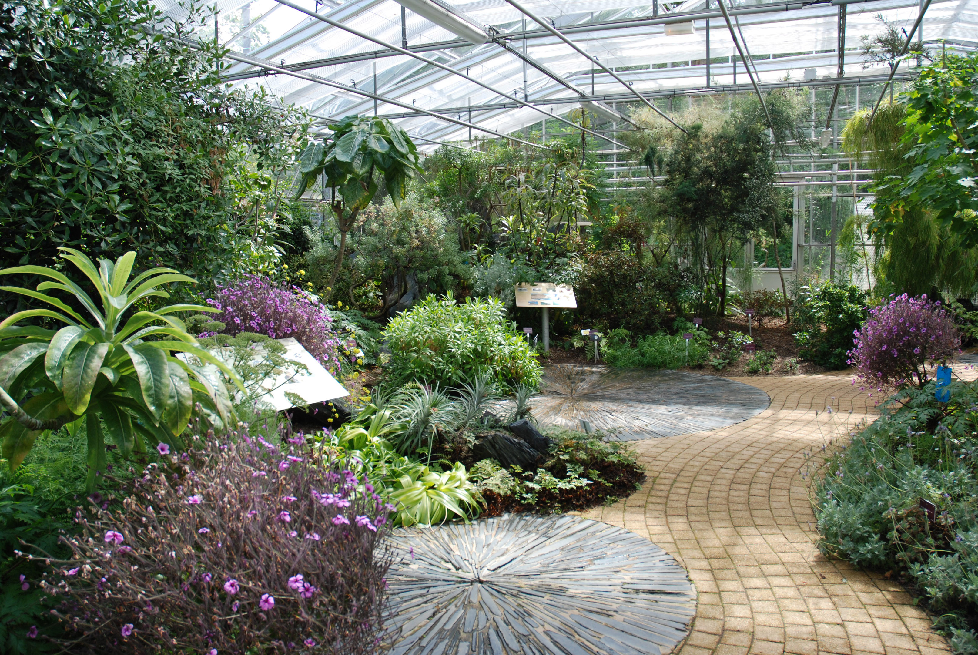 L'intérieur des serres tropicales du Jardin du Conservatoire botanique national de Brest